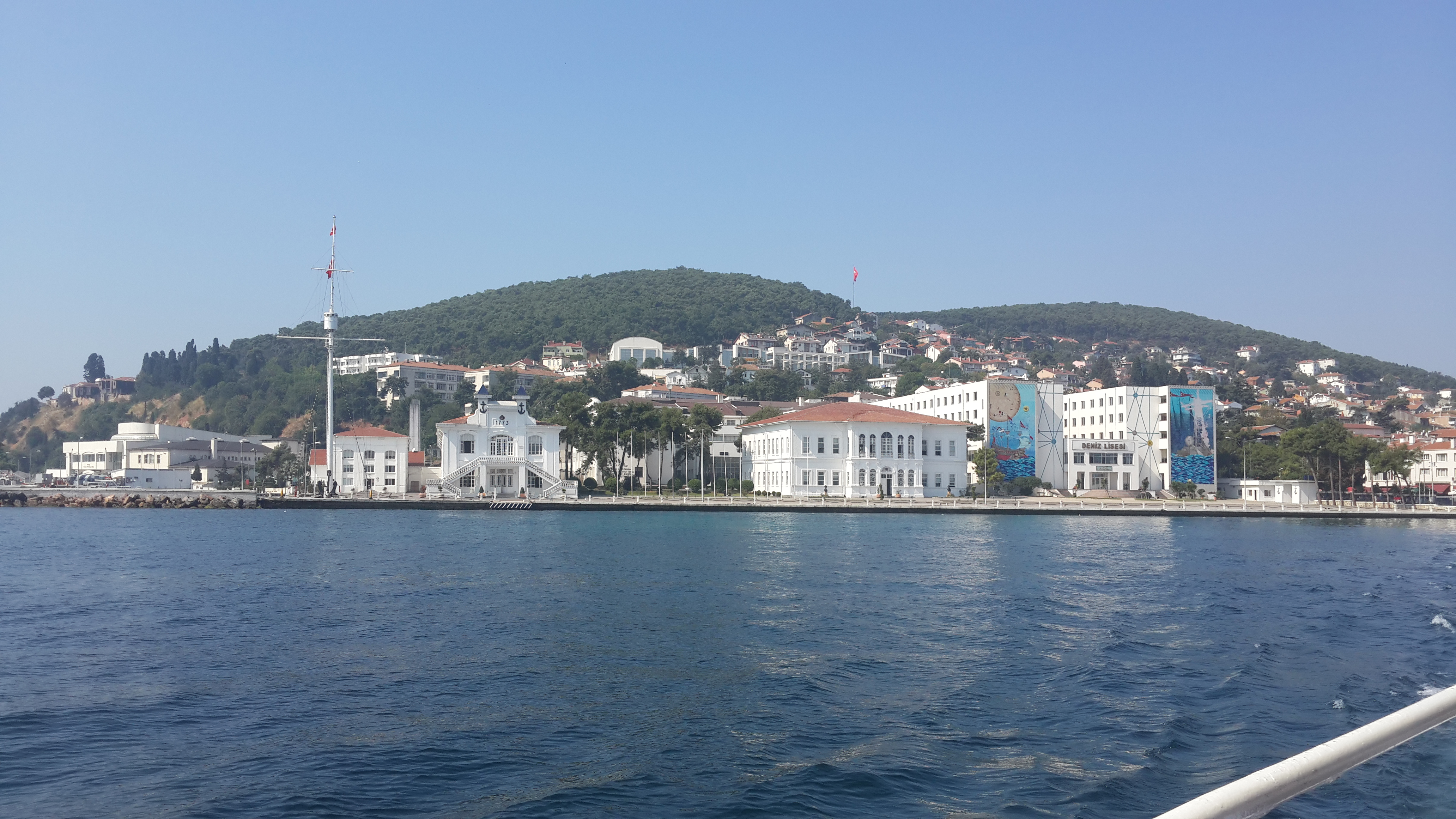 HEYBELİ ADA